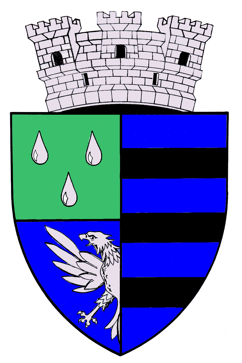 Coat of arms of Băicoi, Romania (from ro.wiki: STEMA orasului Baicoi, judeţul Prahova DESCRIEREA ŞI SEMNIFICAŢIILE elementelor însumate ale stemei orasului Baicoi, judeţul Prahova Descrierea stemei: Scut despicat. Prima parte, tăiată, cuprinde sus, în câmp verde, trei lacrimi de argint; în câmp inferior, pe azur, se află o acvilă bicefală ieşindă de argint. În partea din stânga, pe azur, sunt trei brâuri negre. Scutul este timbrat cu o coroană murală de argint cu trei turnuri crenelate. Semnificaţia elementelor însumate: Lacrimile de argint şi acvila bicefală de argint ieşindă fac aluzie la familiile boiereşti Ghica şi Cantacuzino, familii care au deţinut proprietăţi în localitate. Din aceste familii se trage prinţesa Cleopatra Trubeskoi, care a deţinut în Băicoi un palat şi care a contribuit la ridicarea spirituală şi culturală a localităţii prin ctitorirea unei biserici şi prin înfiinţarea unei şcoli. Brâurile negre simbolizează ţiţeiul, localitatea fiind cunoscută prin activitatea de extracţie a ţiţeiului. Coroana murală, de argint, cu trei turnuri crenelate, semnifică faptul că localitatea are rangul de oraş.)